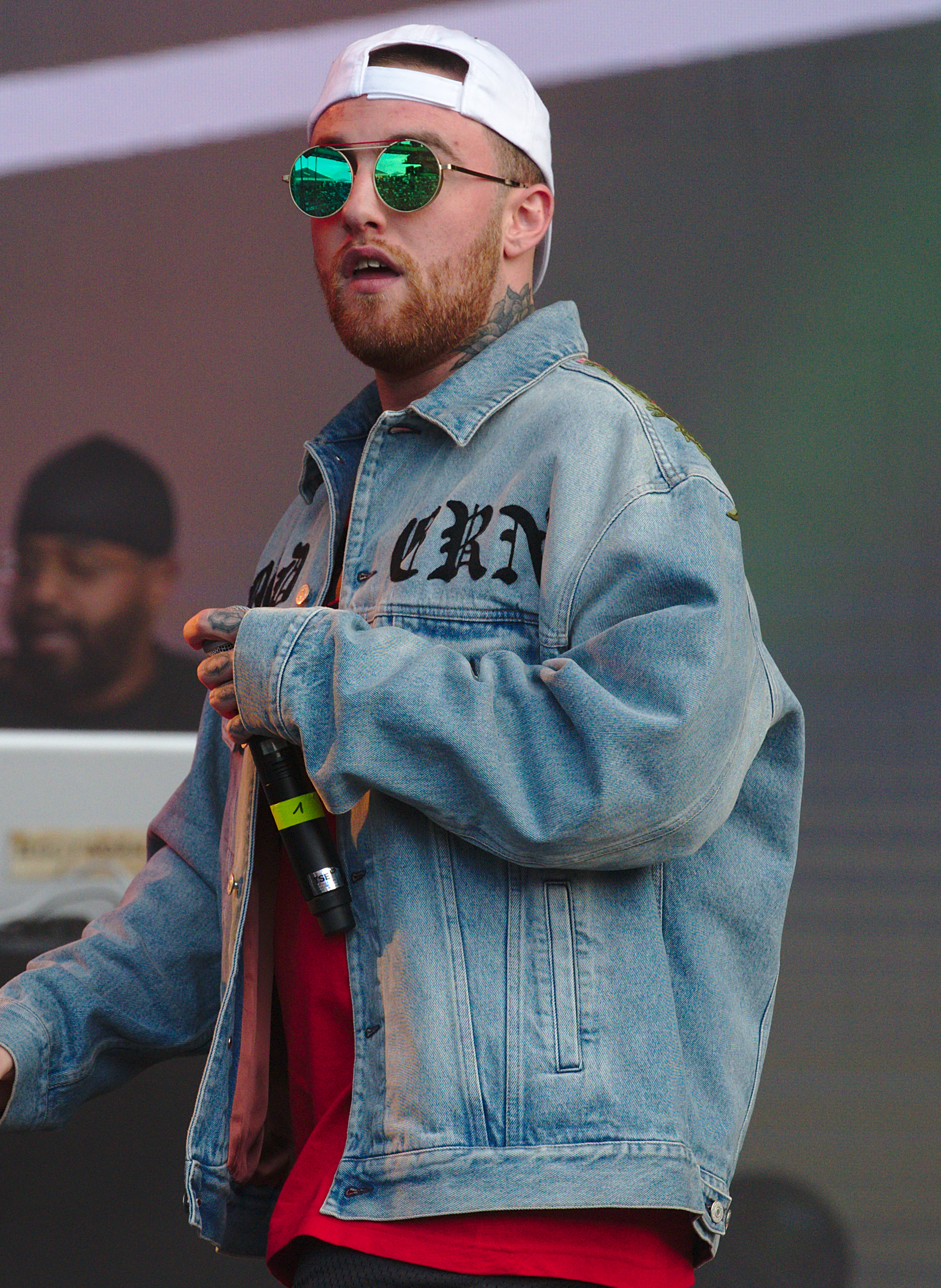 Der US-amerikanische Rapper Mac Miller beim splash! Festival 20 (2017).